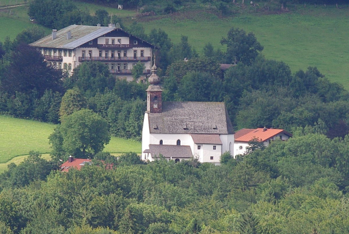 Kirche St. Georg, Nonn